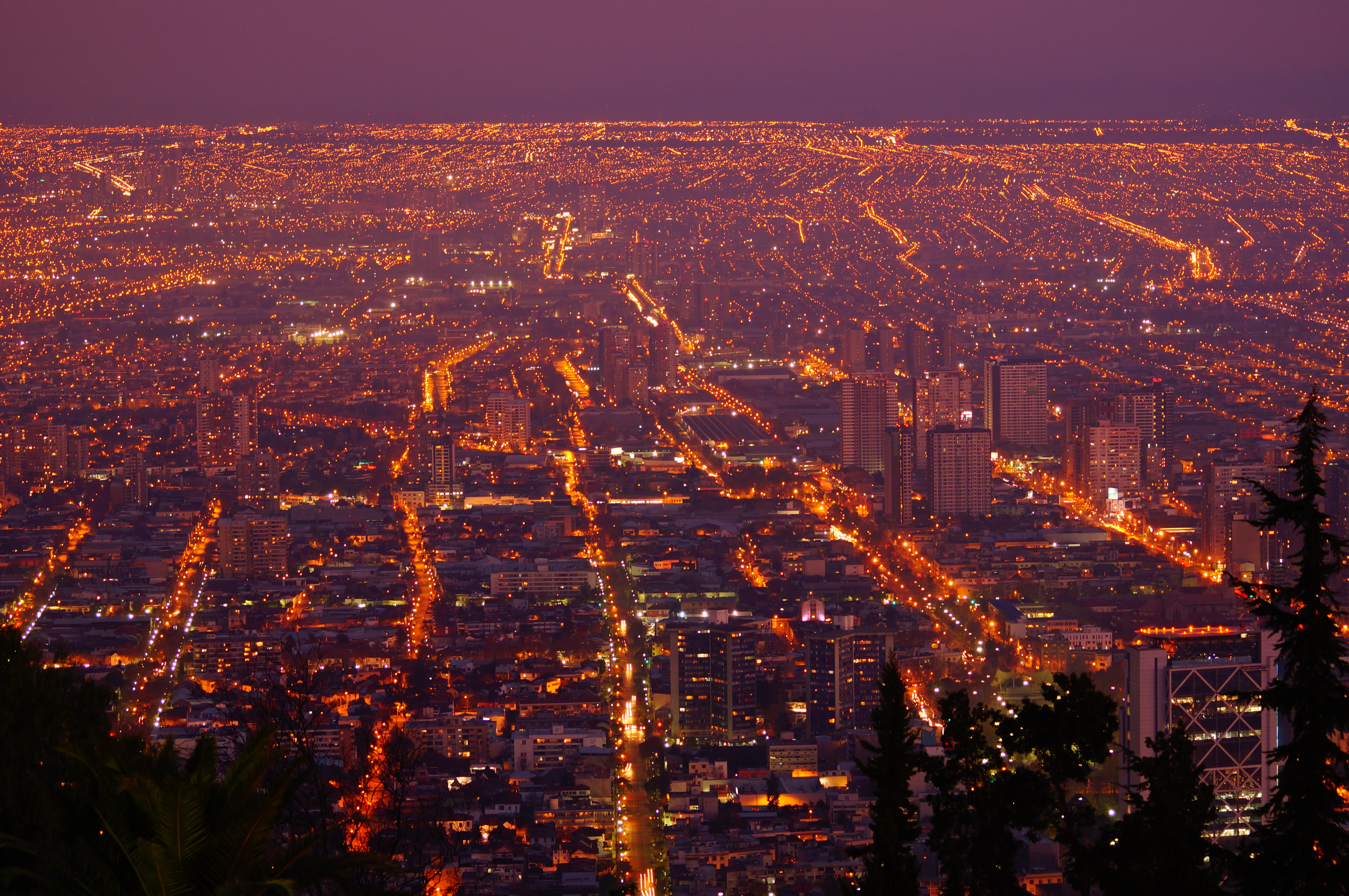 Santiago desde el Cerro San Cristobal